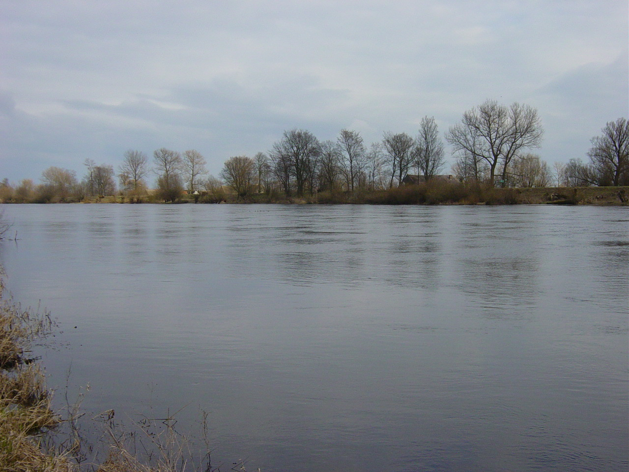 Flusslandschaft an der Warthe in der Nähe von Kostrzyn